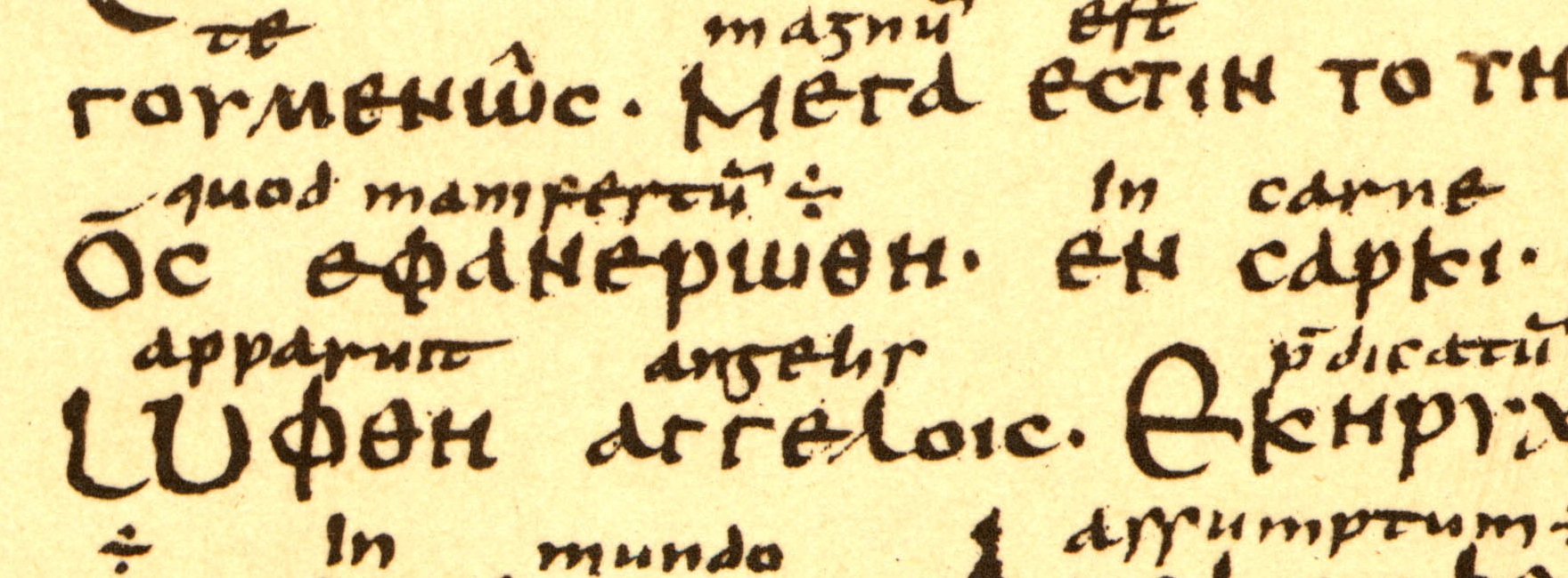 fragment with the text of 1 Timothy 3:16; famous textual vartiant